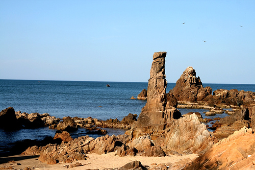 Da Nhay (Jumping Rock) Beach, Quang Binh, Vietnam